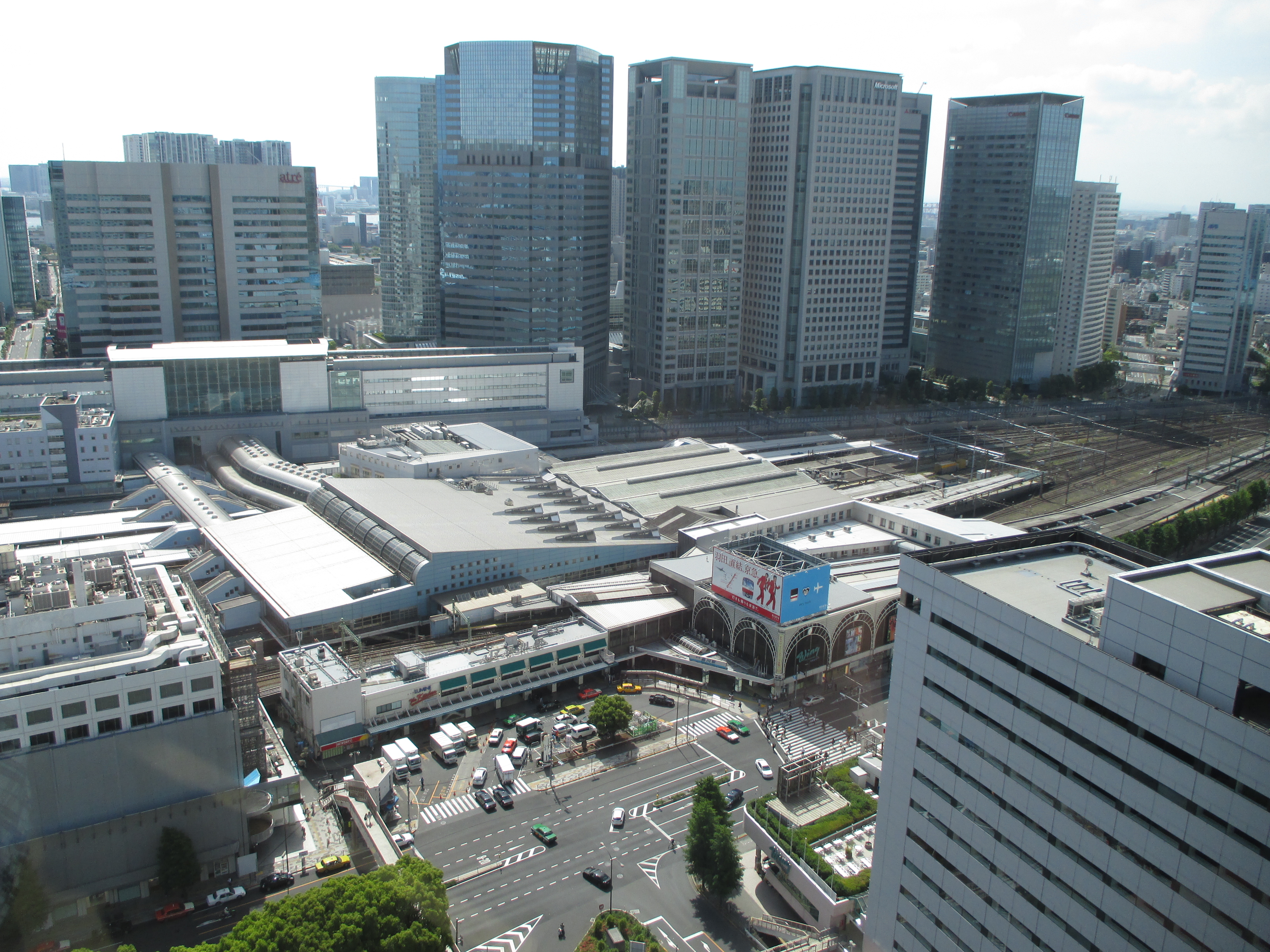 JR品川駅 Shinagawa sta.